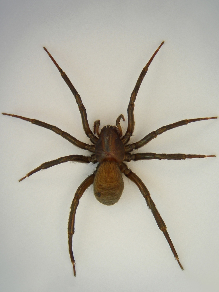 Weibchen der Wasserspinne Argyroneta aquatica. Fundort: Wien Prater. Landaufnahme.